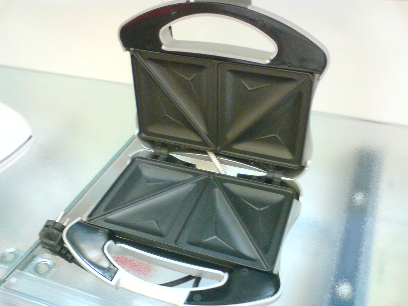 Fotografie otevřeného toustovače